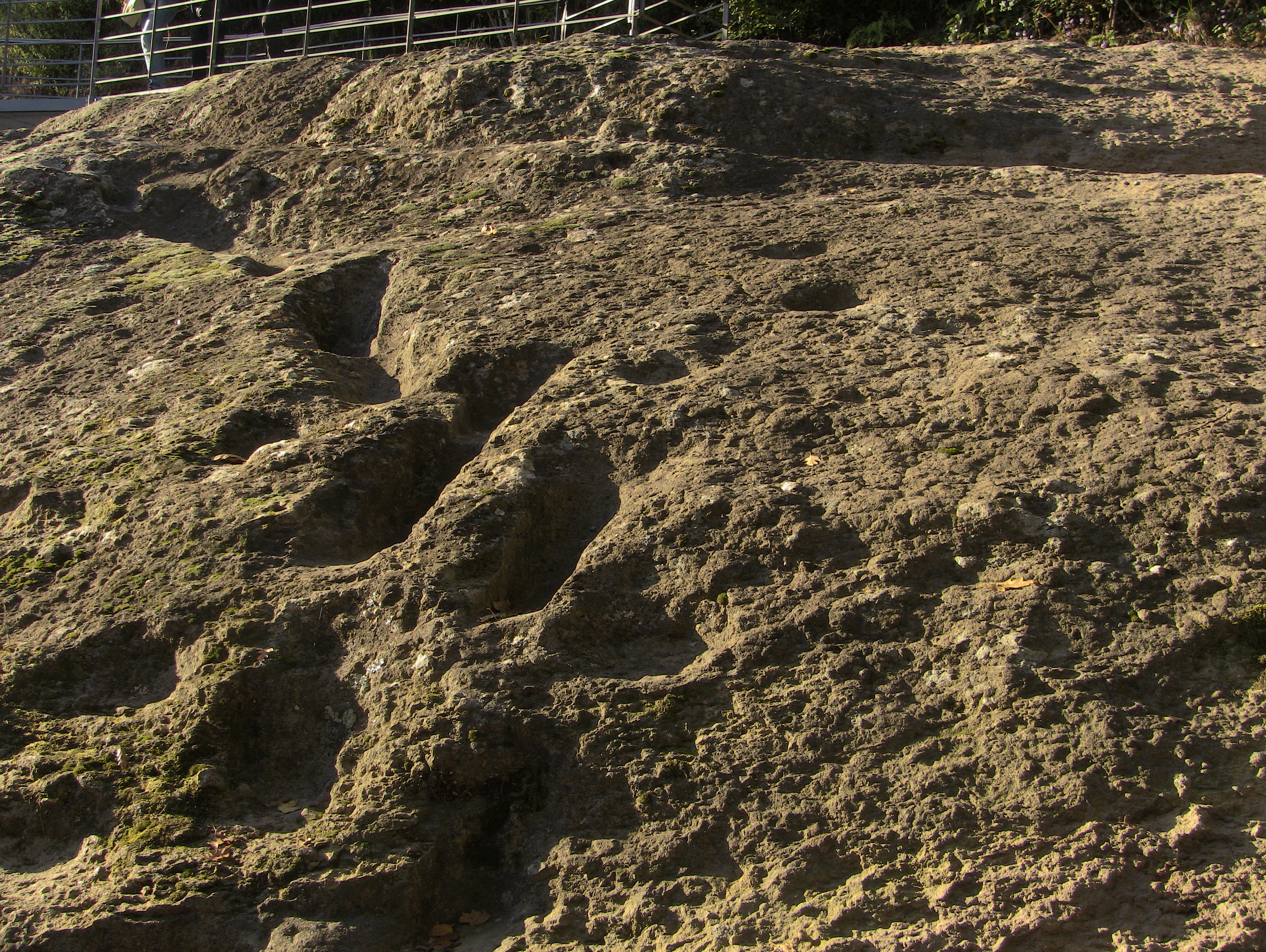 "Ciampate del Diavolo" , 350.000 years old footprints at Tora e Piccilli (CE) Italy